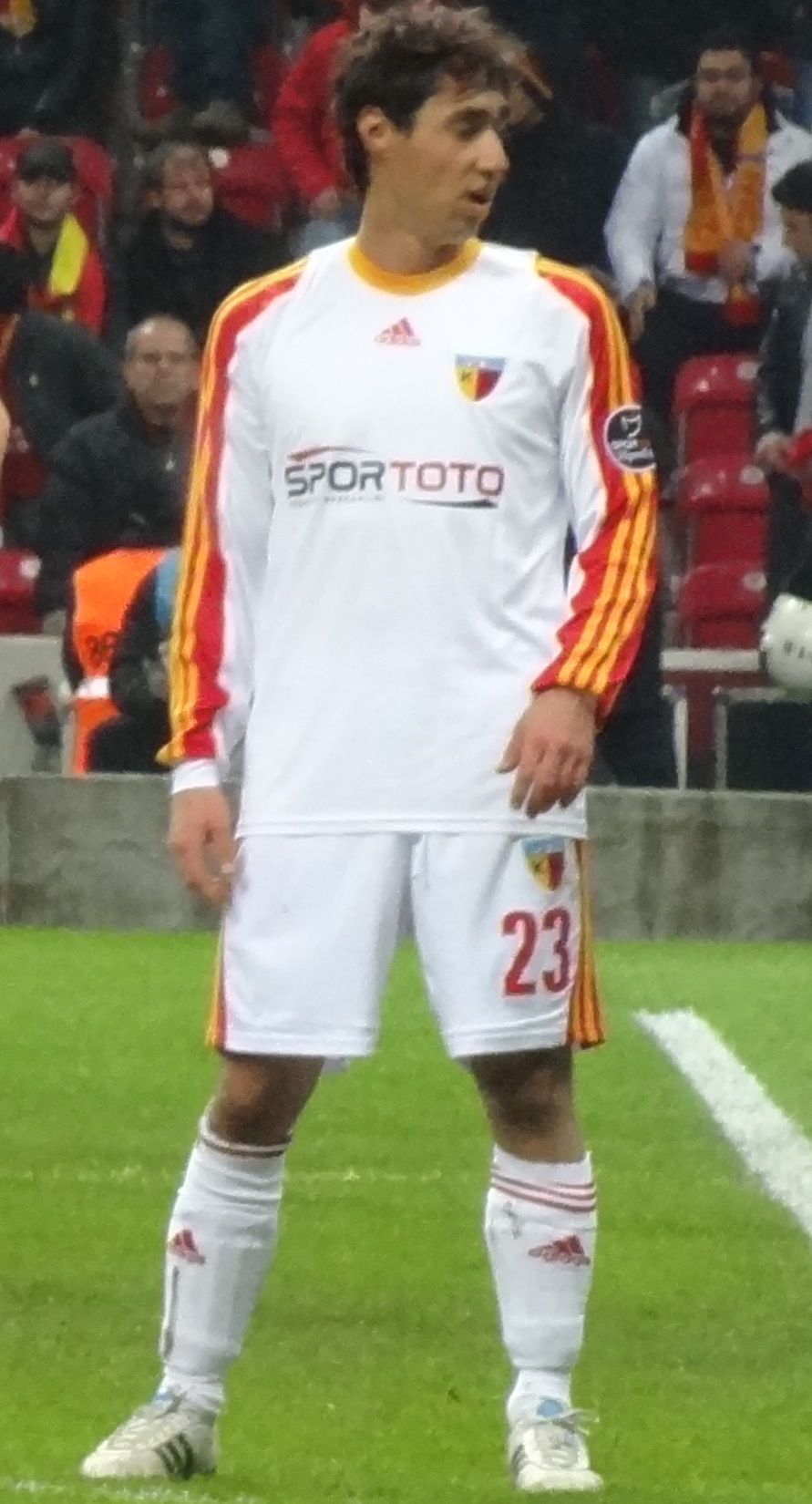 Furkan Özçal Galatasaray deplasmanında